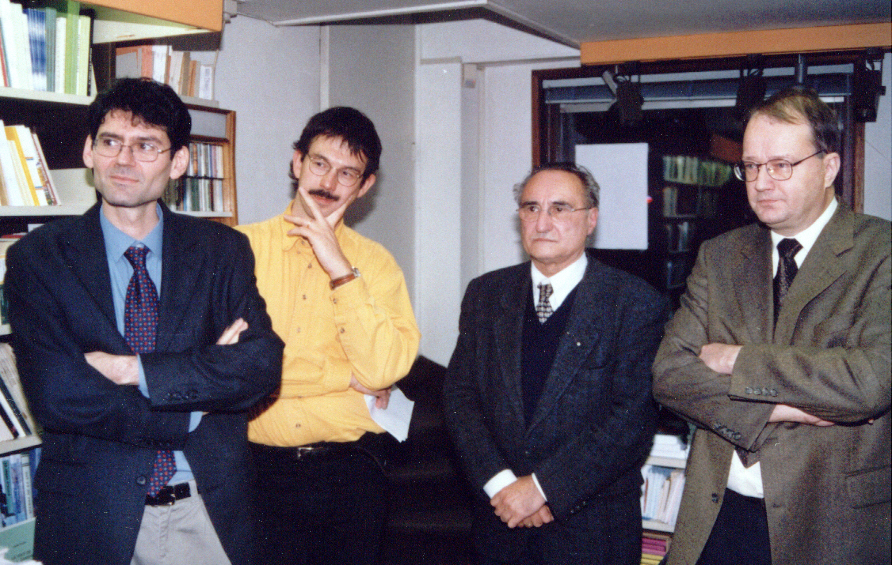 "Tri oficistoj", de maldekstre: Pasquale Zapelli, István Ertl, hazarde tie staras Wim De Smedt, Osmo Buller. Dum Malferma Tago, novembro 2001, okaze de paroladeto de Humphrey Tonkin respekte al la tri demisiintoj.